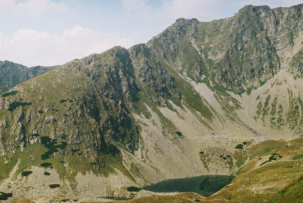 Bystré plesá: Velké Bystré pleso, Dlhé Bystré pleso